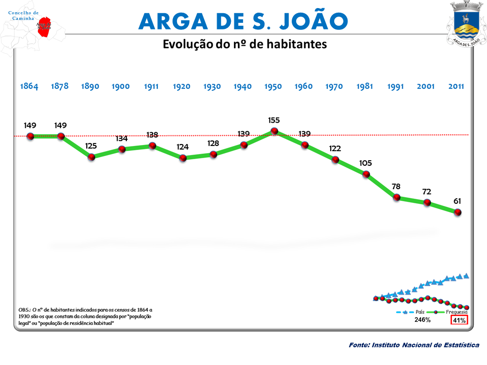 Censos 1864/2011